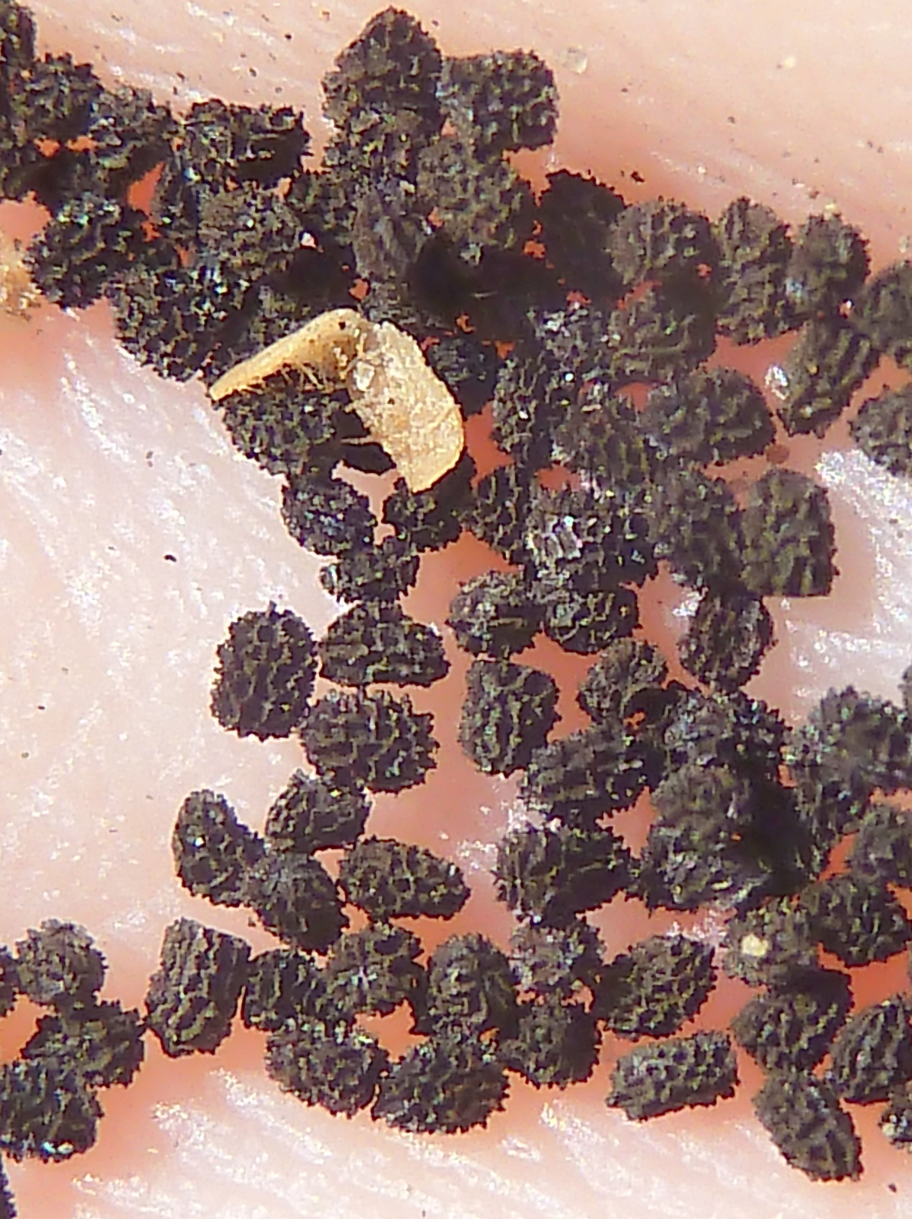 Antirrhinum majus (Boca de dragón) - Semillas sueltas. - Cultivado/ornamental, Paseo del Puerto, Alicante (España).